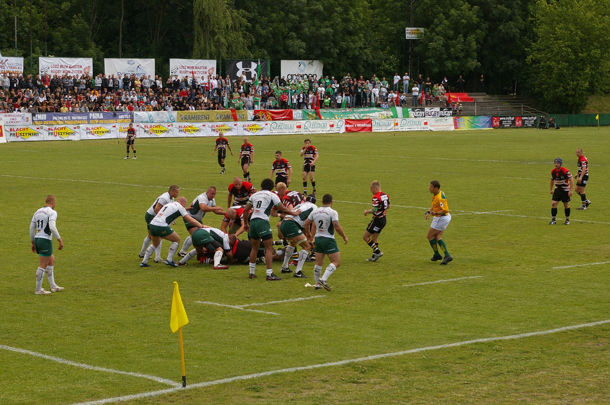 Finałowy mecz ekstraligi rugby sezonu 2009/2010 pomiędzy Budowlanymi Łódź a Lechią Gdańsk Personality rights warning Although this work is freely licensed or in the public domain, the person(s) shown may have rights that legally restrict certain re-uses unless those depicted consent to such uses. In these cases, a model release or other evidence of consent could protect you from infringement claims.